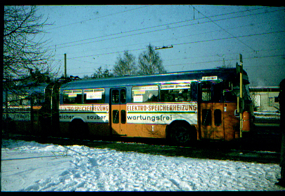 O-Bus Henschel 160 in Kaiserslautern